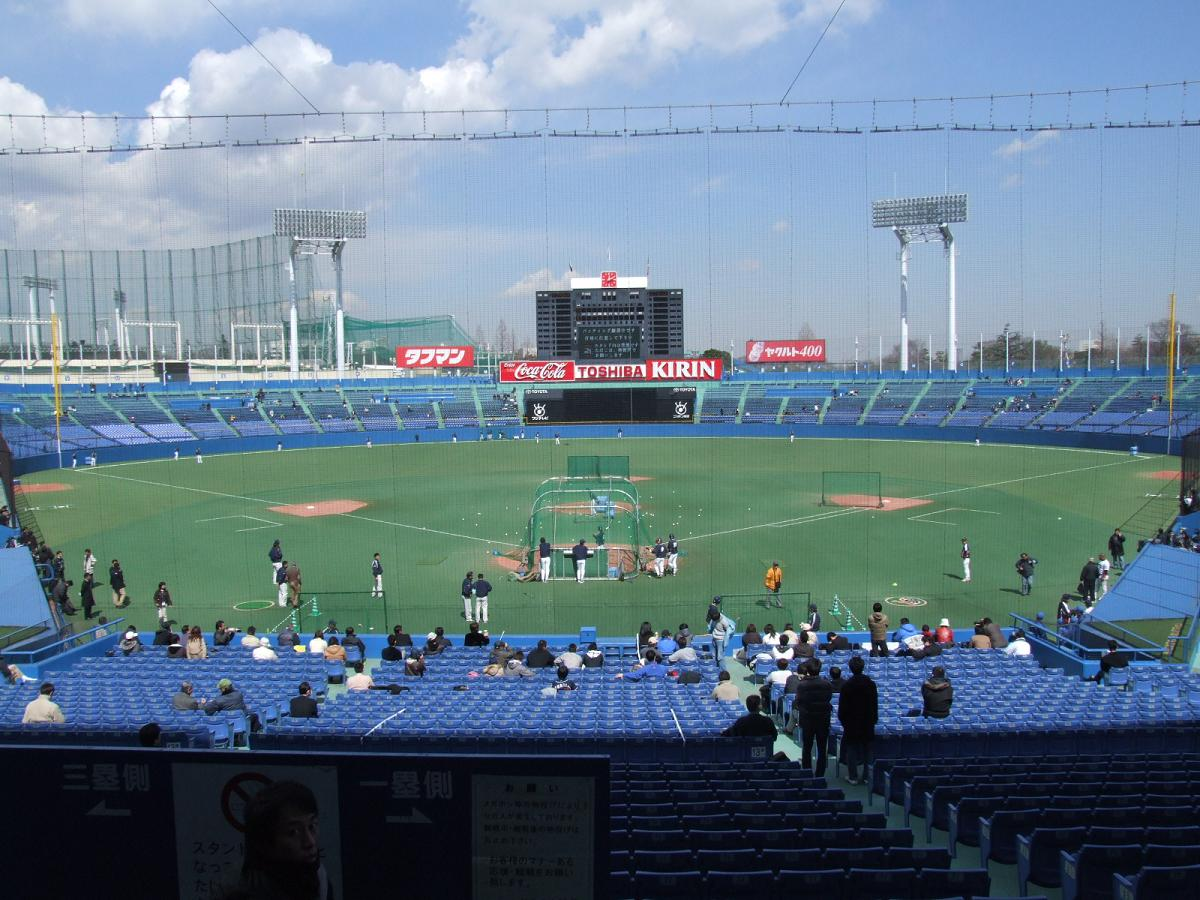 撮影者-利用者:ROG 撮影日-2006年3月14日 2006年3月14日 (火) 20:20 . . ROG . . 1200×900 (164,446 バイト)